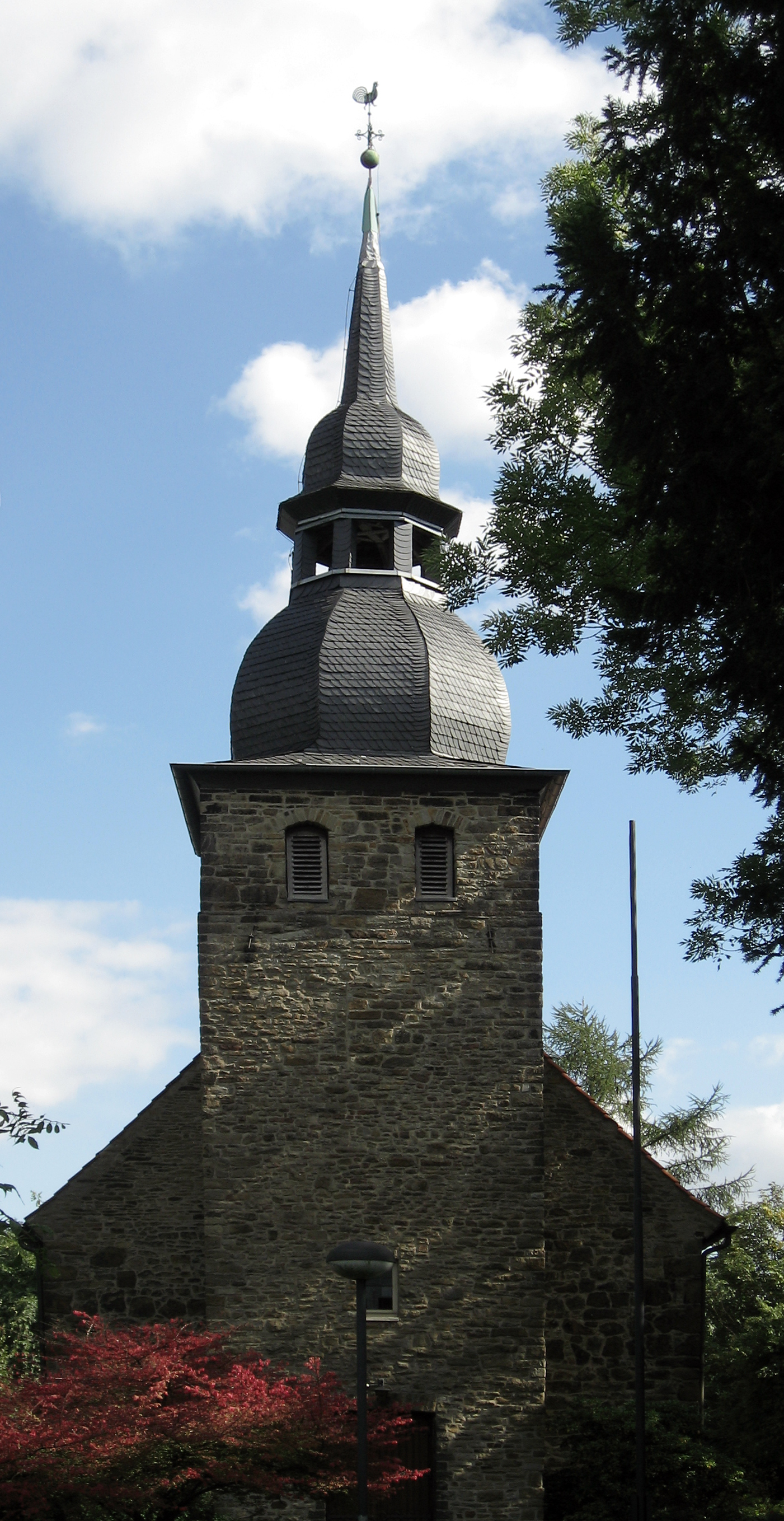 Dortmund, Kirchhörde, Klein-Reinoldi, ursprünglich St. Patroklus